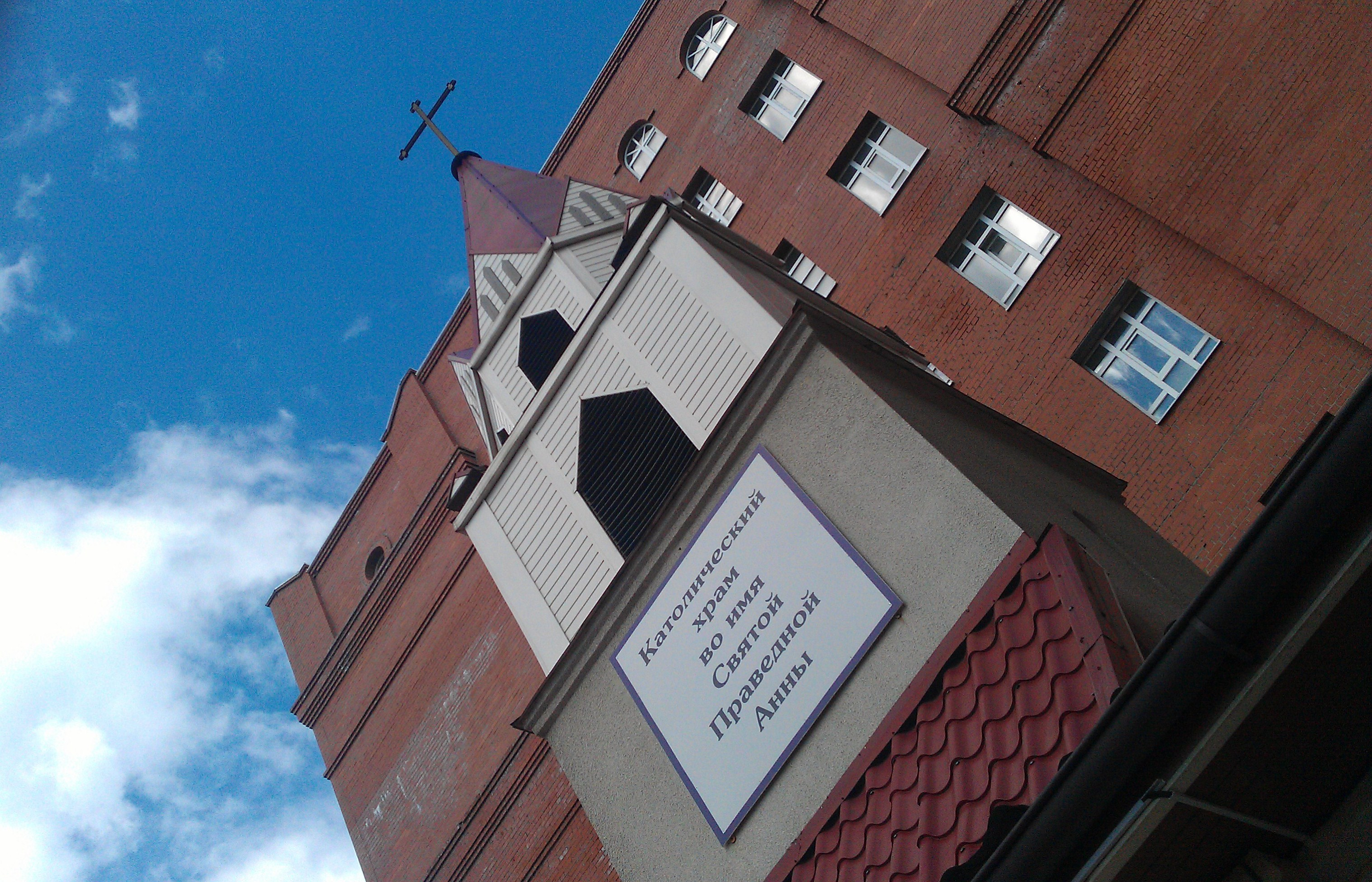 Римско-католический храм Святой Анны, Екатеринбург